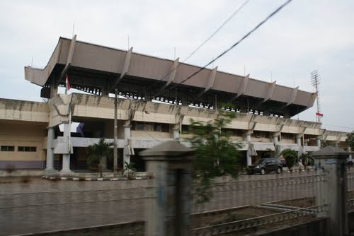 bldgerg